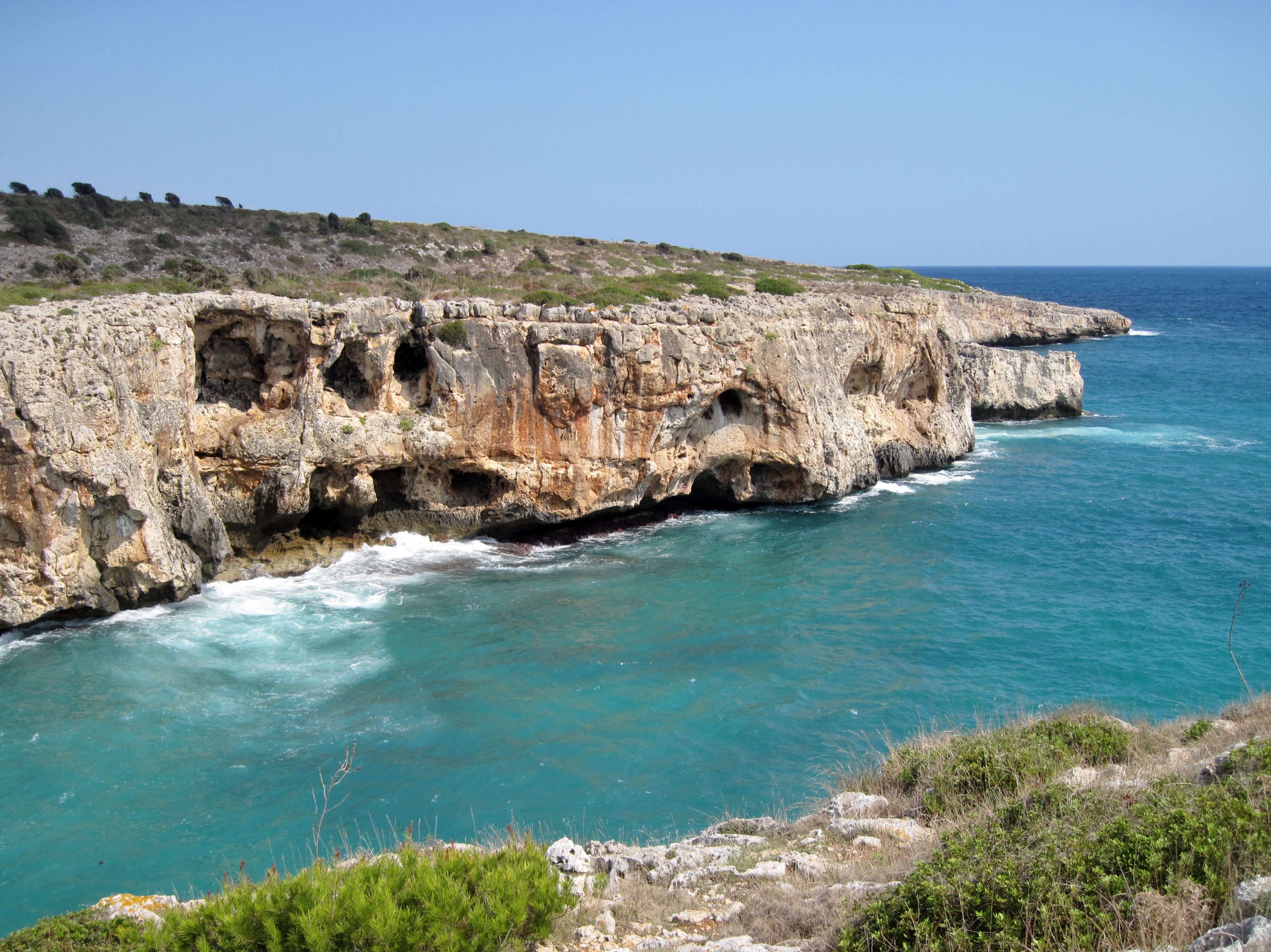 Cala Sequer, Bucht an der Küste der Gemeinde Manacor, Mallorca, Spanien